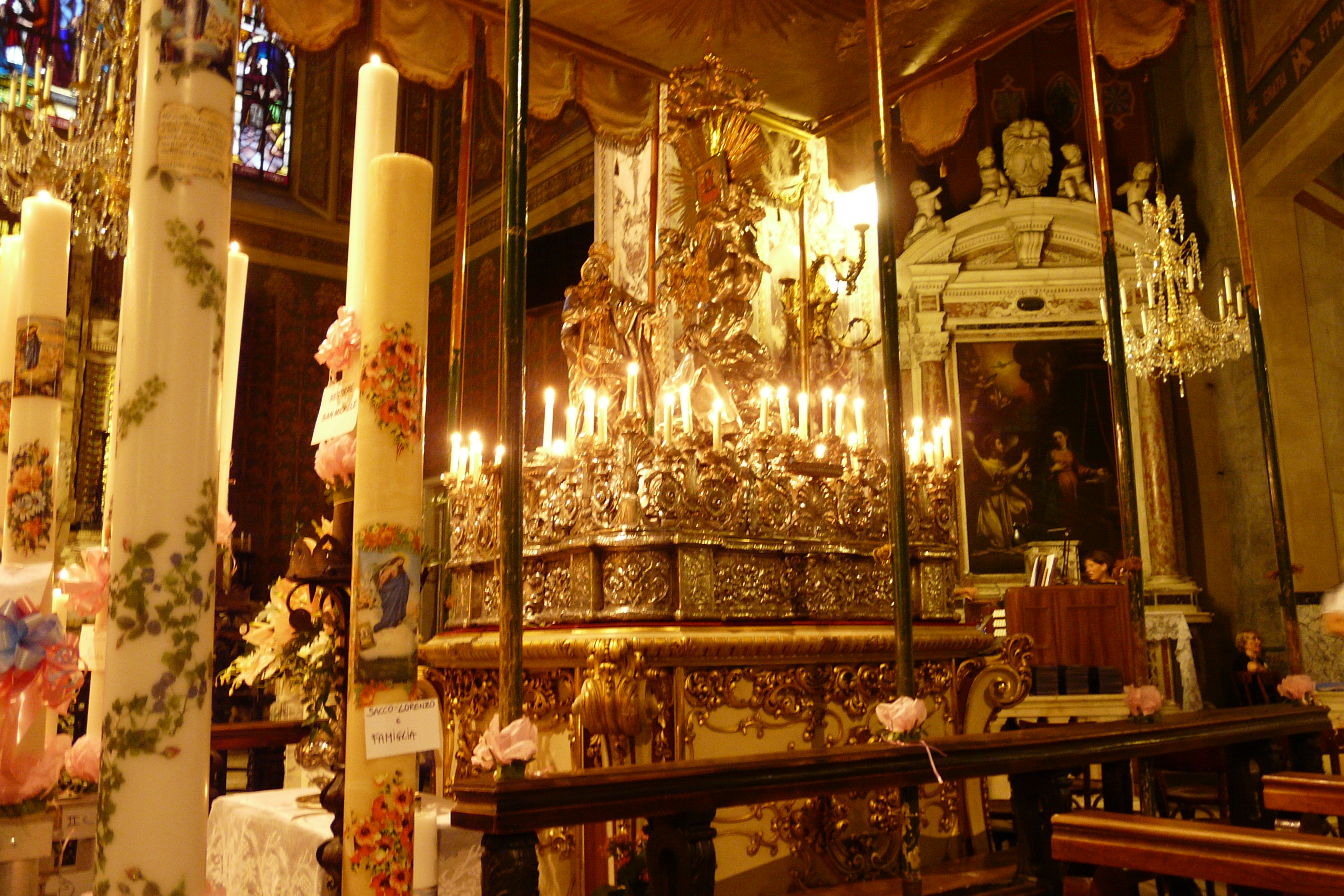 Basilica dei Santi Gervasio e Protasio, arca processionale della Nostra Signora di Montallegro, Rapallo, Liguria, Italia